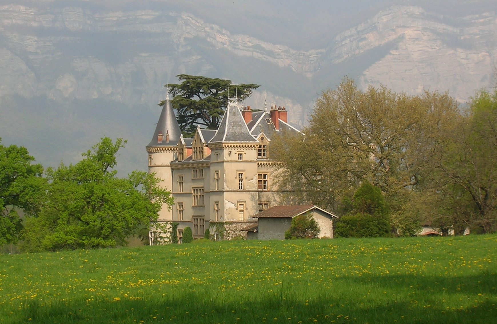 Château de Miribel, ou château de Vorz, Villard-Bonnot, Isère, AuRA, France.